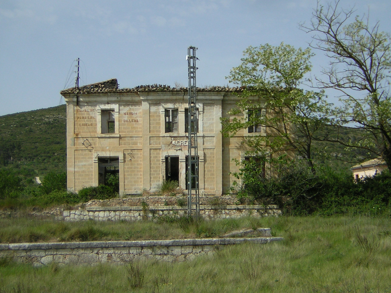 Estación de Agres (provincia de Alicante).